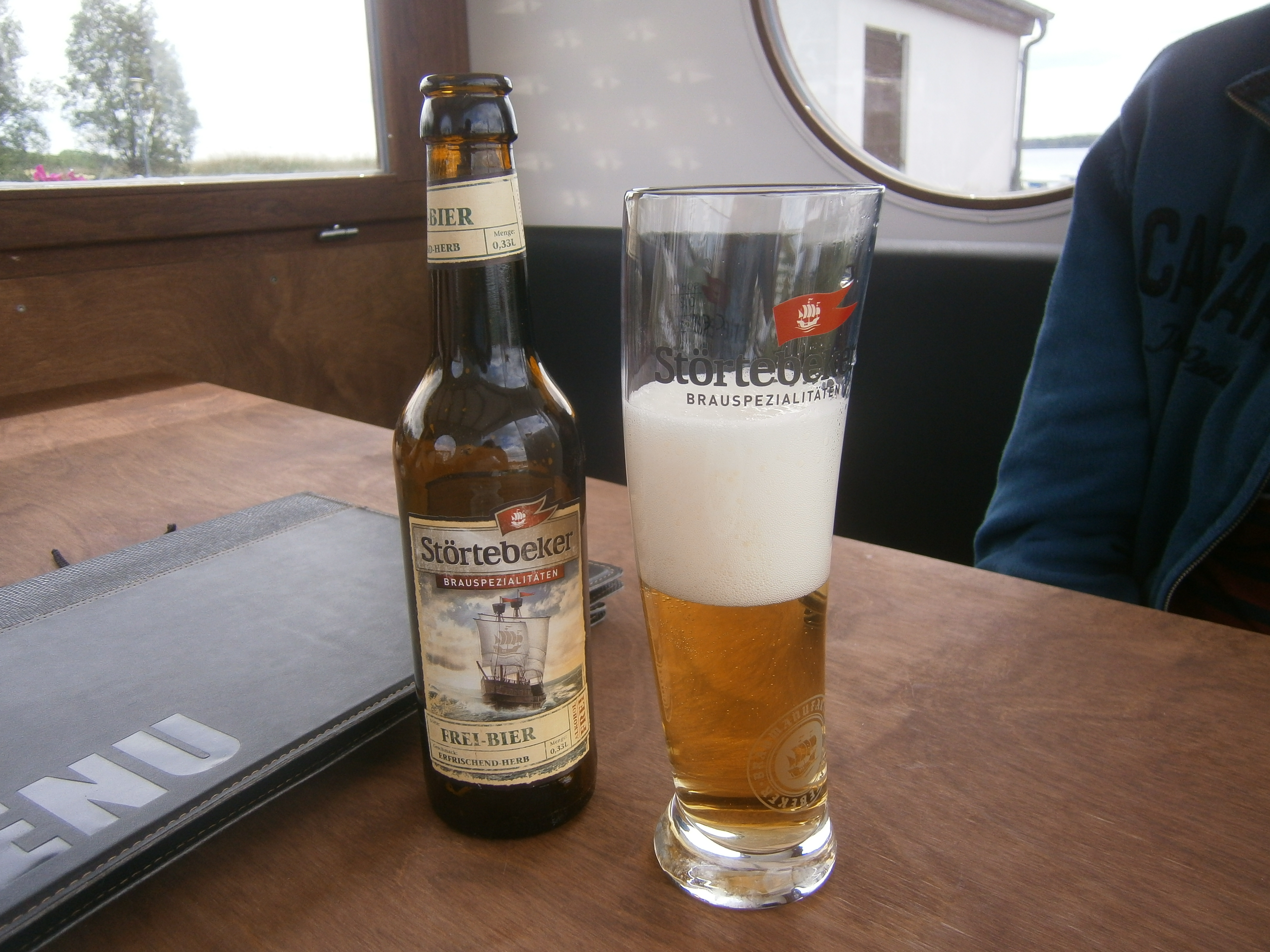 Designergläser mit Einsatz für Bier kommen in den 2000er Jahren auf um die Identität der Marke zu markieren. Das Bierglas wurde in Form eines Segels gestaltet um die Nähe zum Meer und zur Schifffahrt für die Biermarke "Störtebecker" zu kennzeichnen. Diese Glasform für ein norddeutsches Weizenbier wird in Gaststätten an der Ostsee für alle Bierarten der benannten Brauerei eingesetzt.